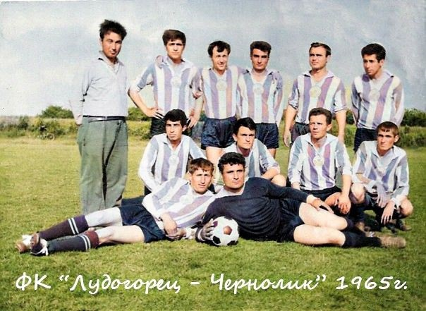 ФК "Лудогорец - Чернолик" 1965г.